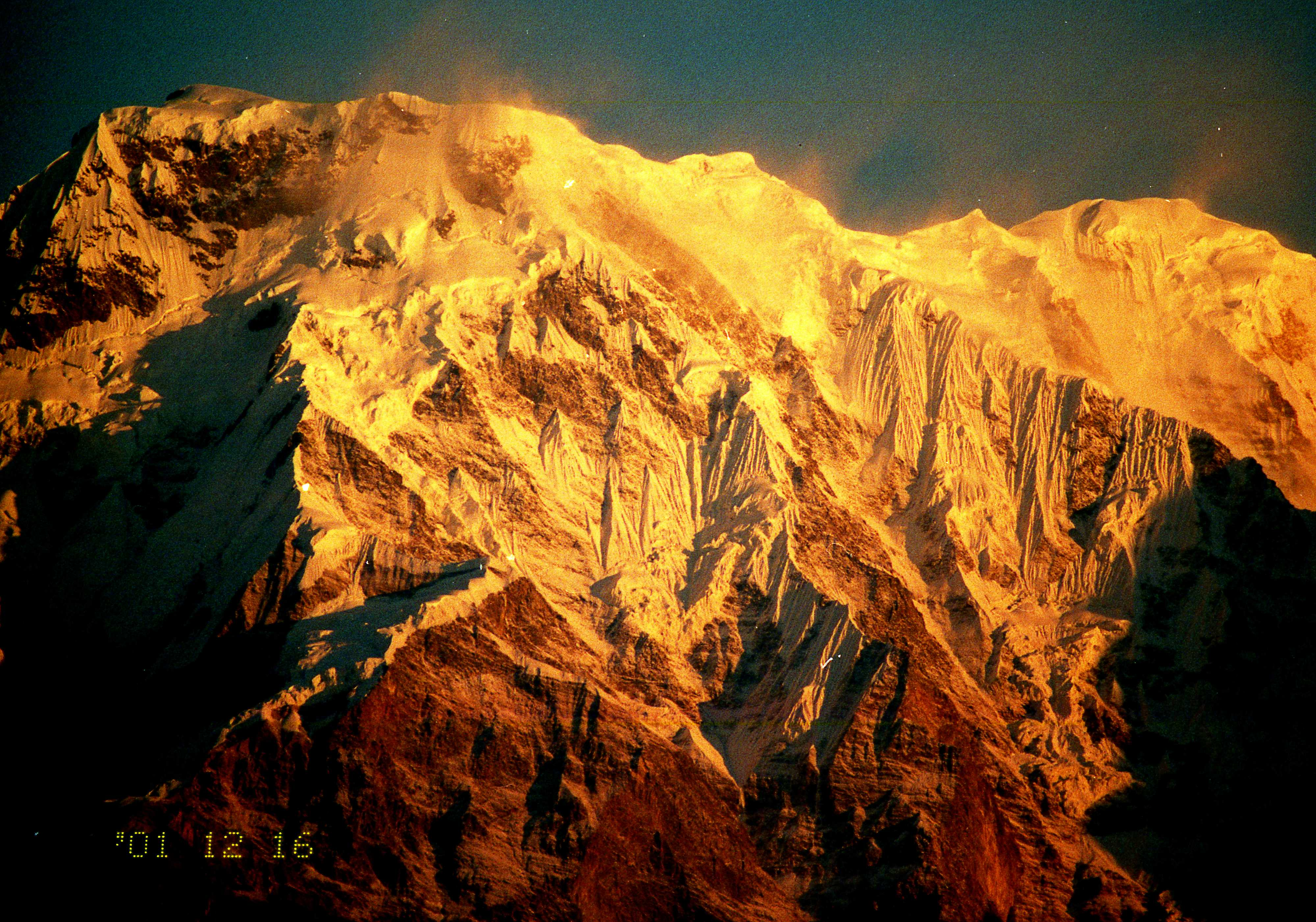 アンナプルナⅢ、マチャプチャレ ～photo by Autumn Snake 【おぉたむ すねィく探検隊】写真部門 担当 大原佳苗